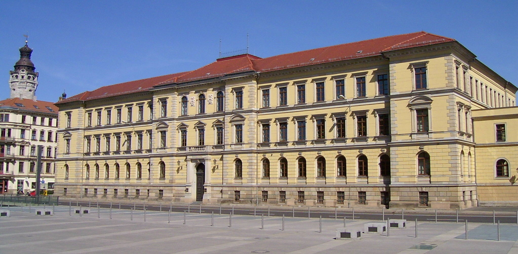 Hauptgebäude des Landgerichts Leipzig und Sitz des Sächsischen Verfassungsgerichtshofes